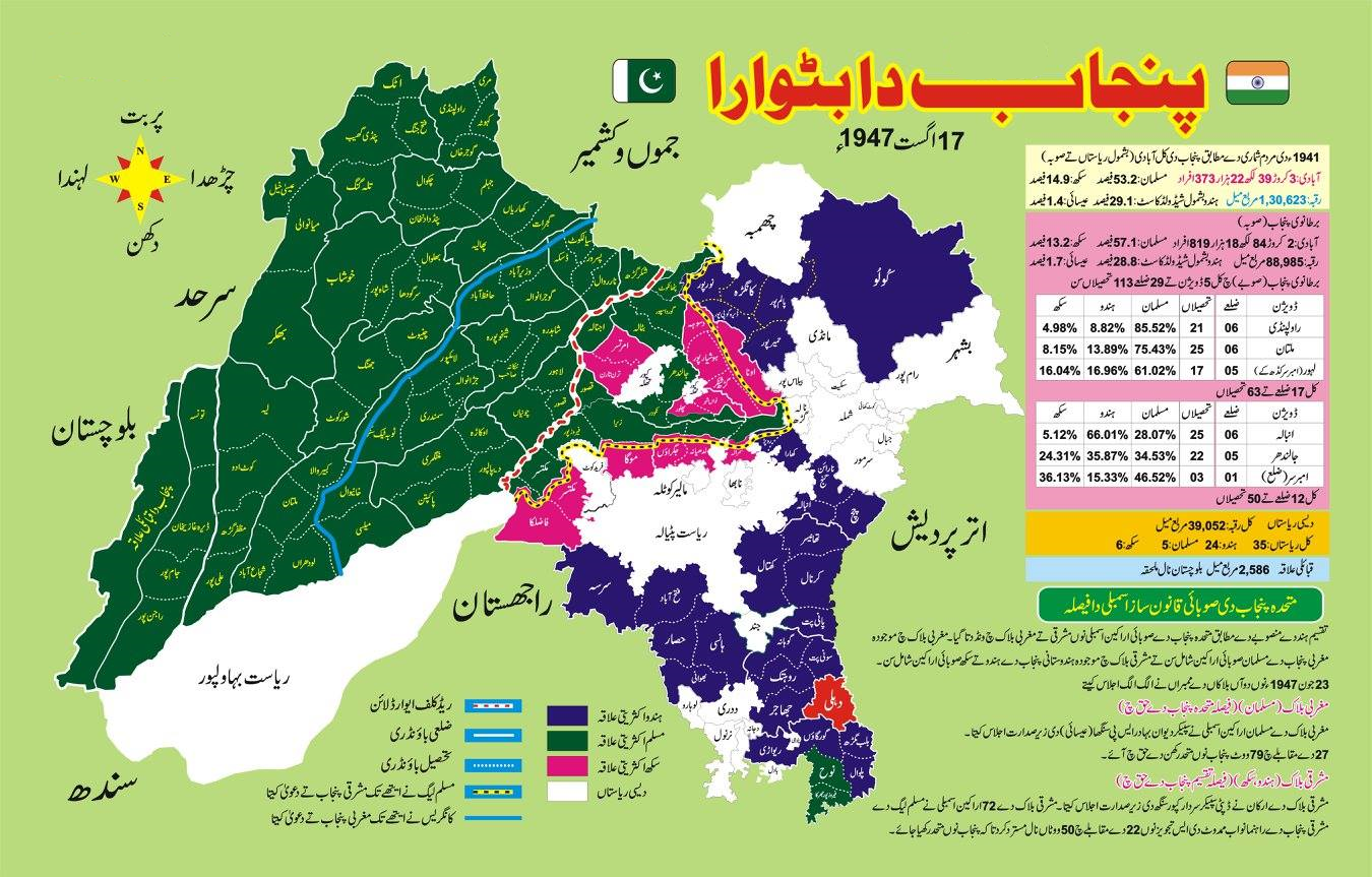 پنجابی: Partition of Punjab Map in Punjabi Shahmukhi